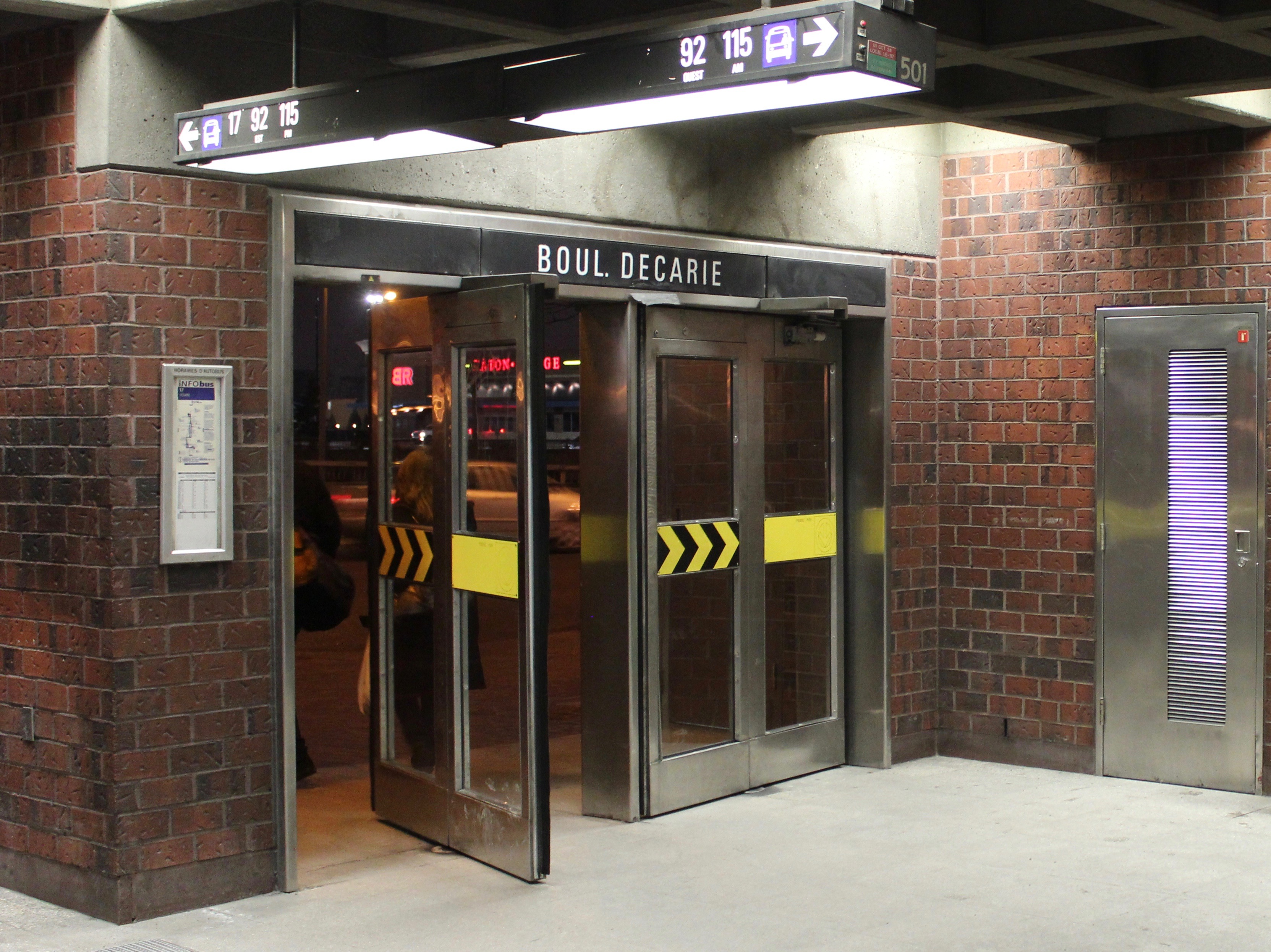 Portes papillon de la station Namur du métro de Montreal